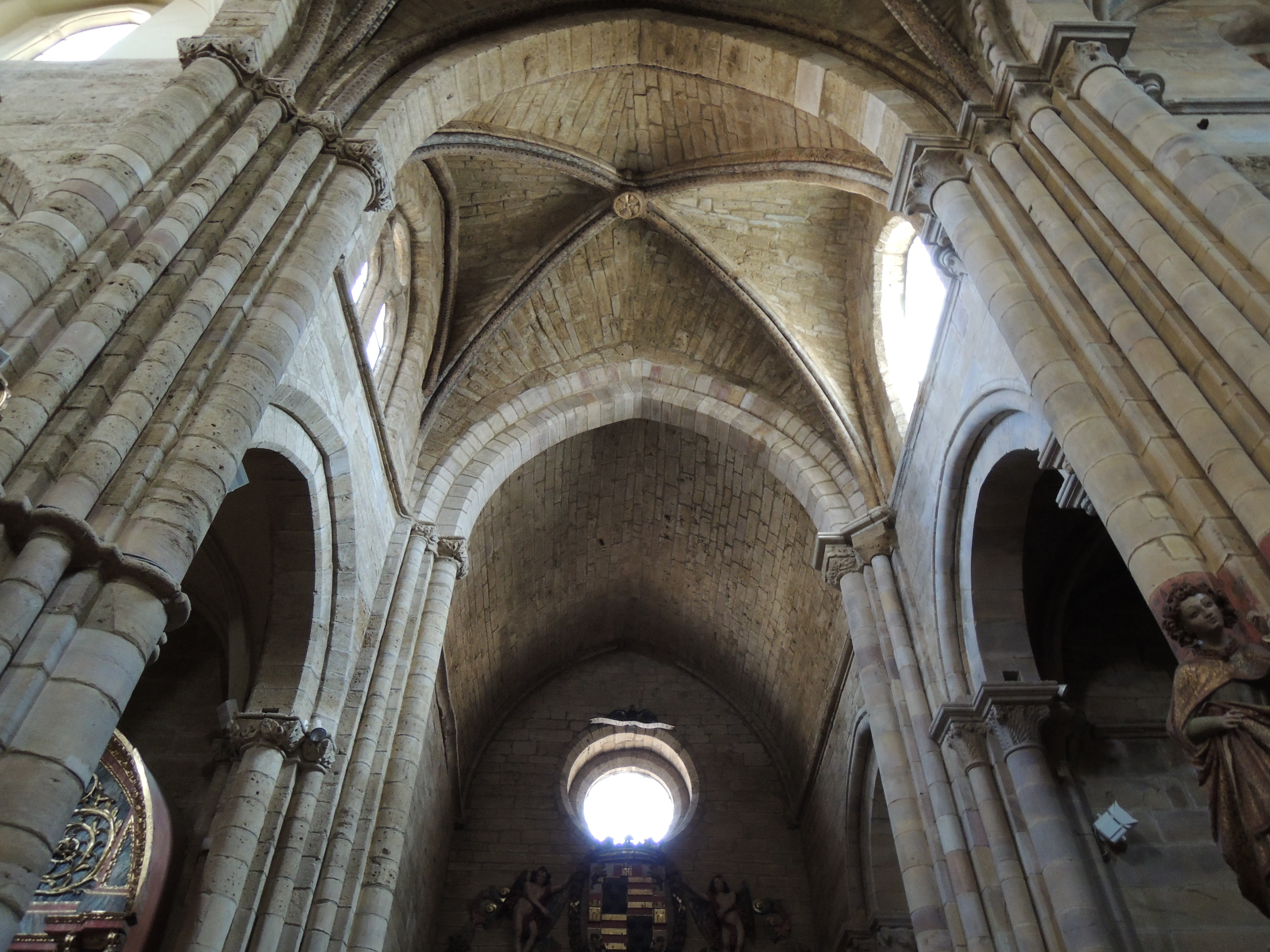 Iglesia deSanta María del Azogue de Benavente